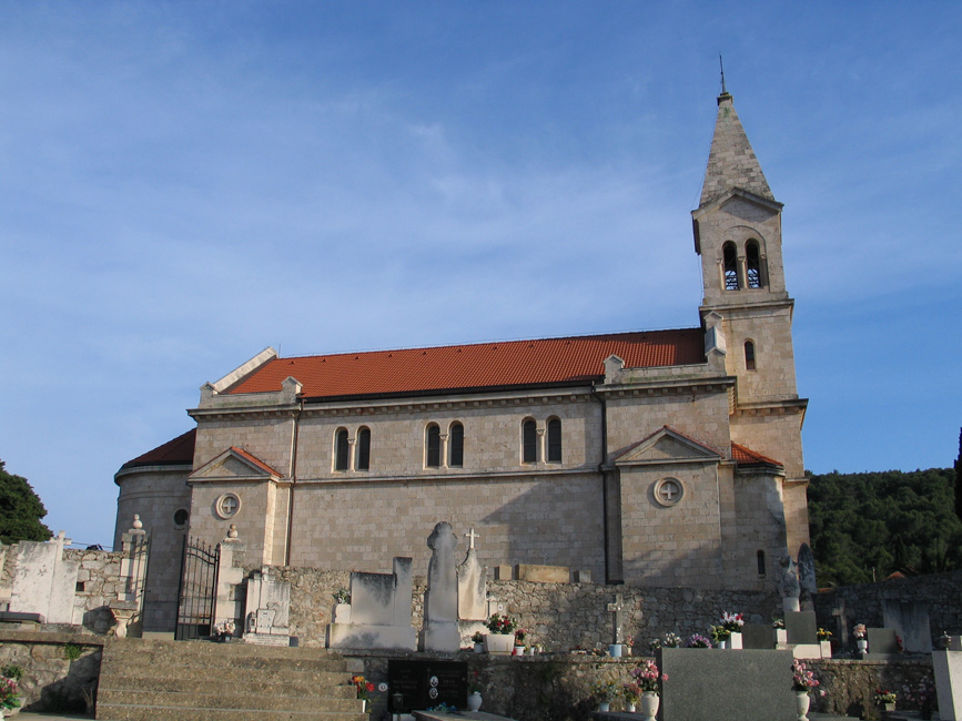 župna crkva sv. Mihovila u Dolu na Hvaru